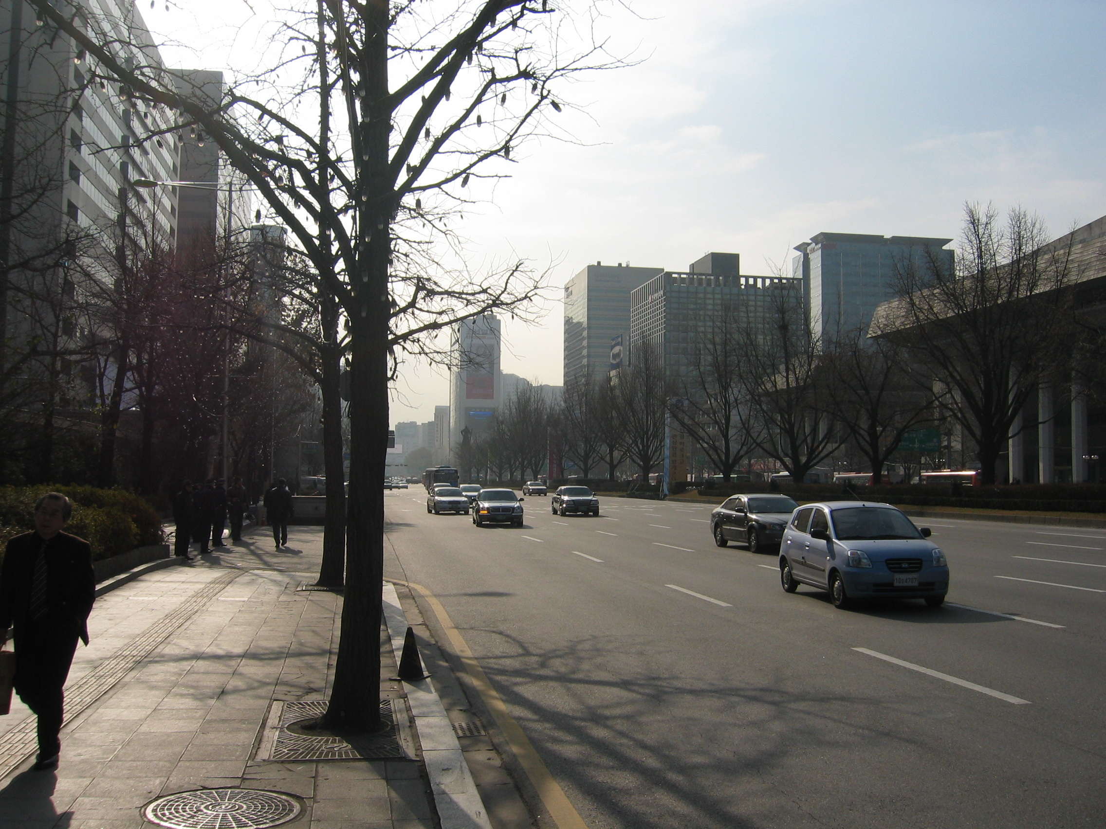 "Sejongro"(Sejong blvd.) in Jongrogu, Seoul, Korea